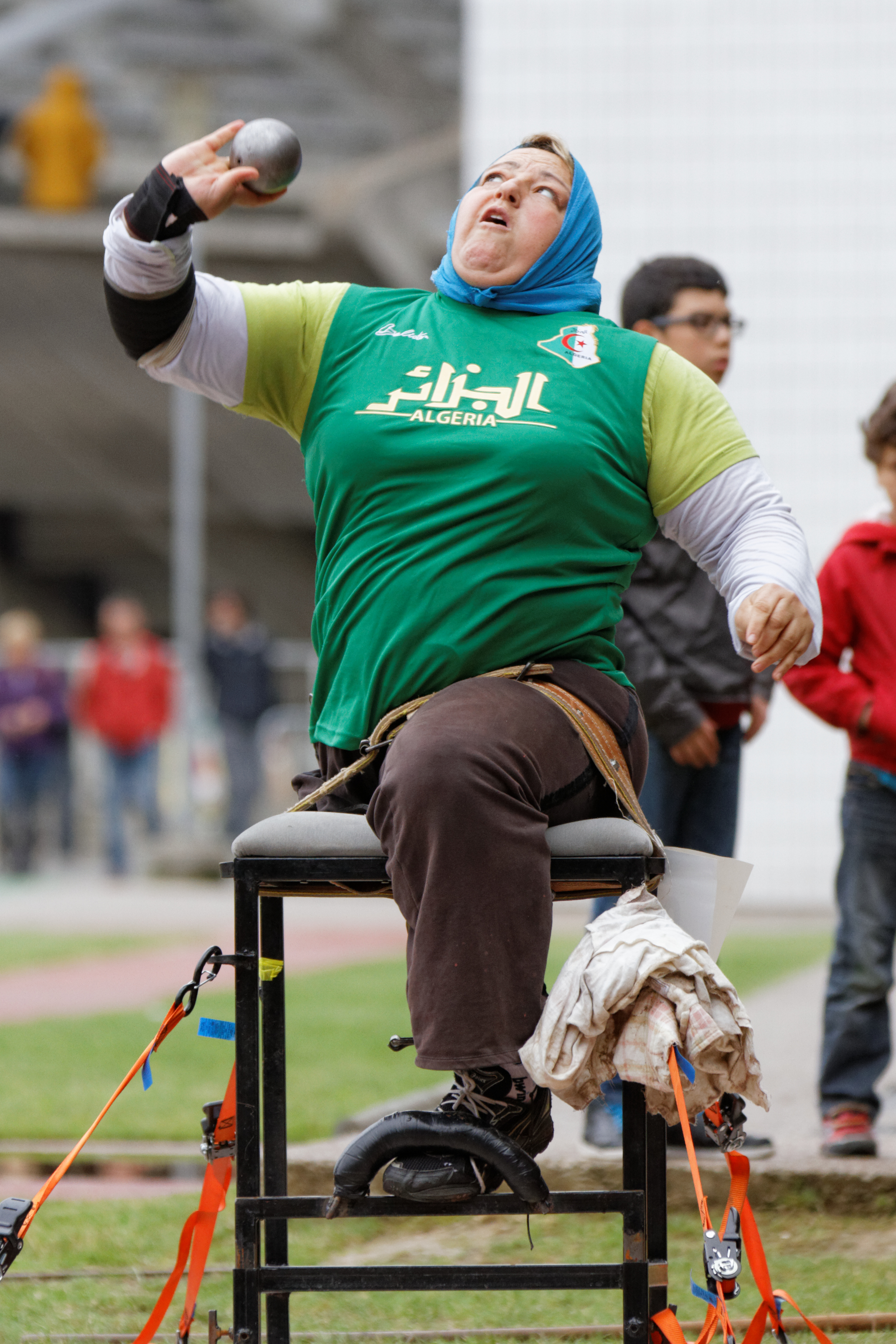 Nadia Medjemedj, lancer du poids (3Kg), Meeting d'Athlétisme Paralympique de Paris, 4 juin 2014.